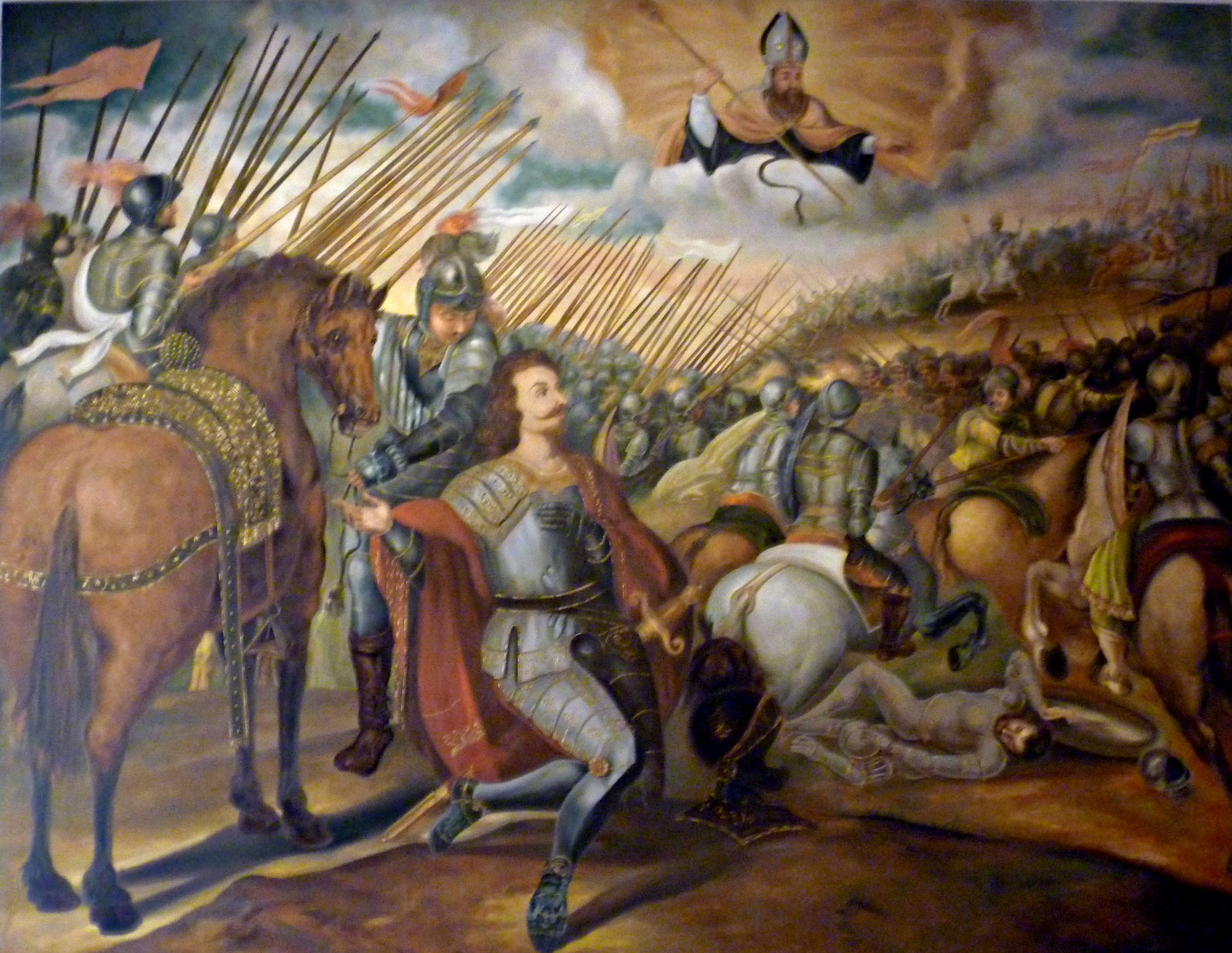 Óleo sobre lienzo. Miguel de Santiago, 1655. Convento de San Agustín - Quito DM.